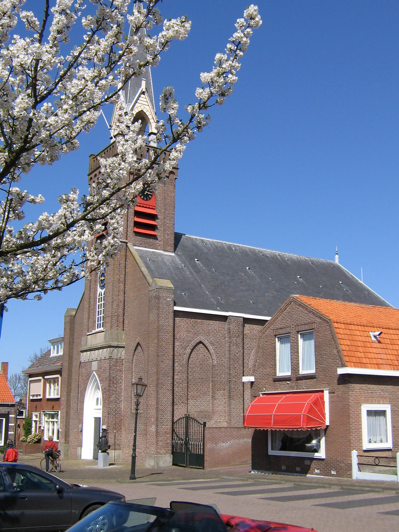 Erremu, durpskerke Arnemuiden, dorpskerk Arnemuiden (NL), central church